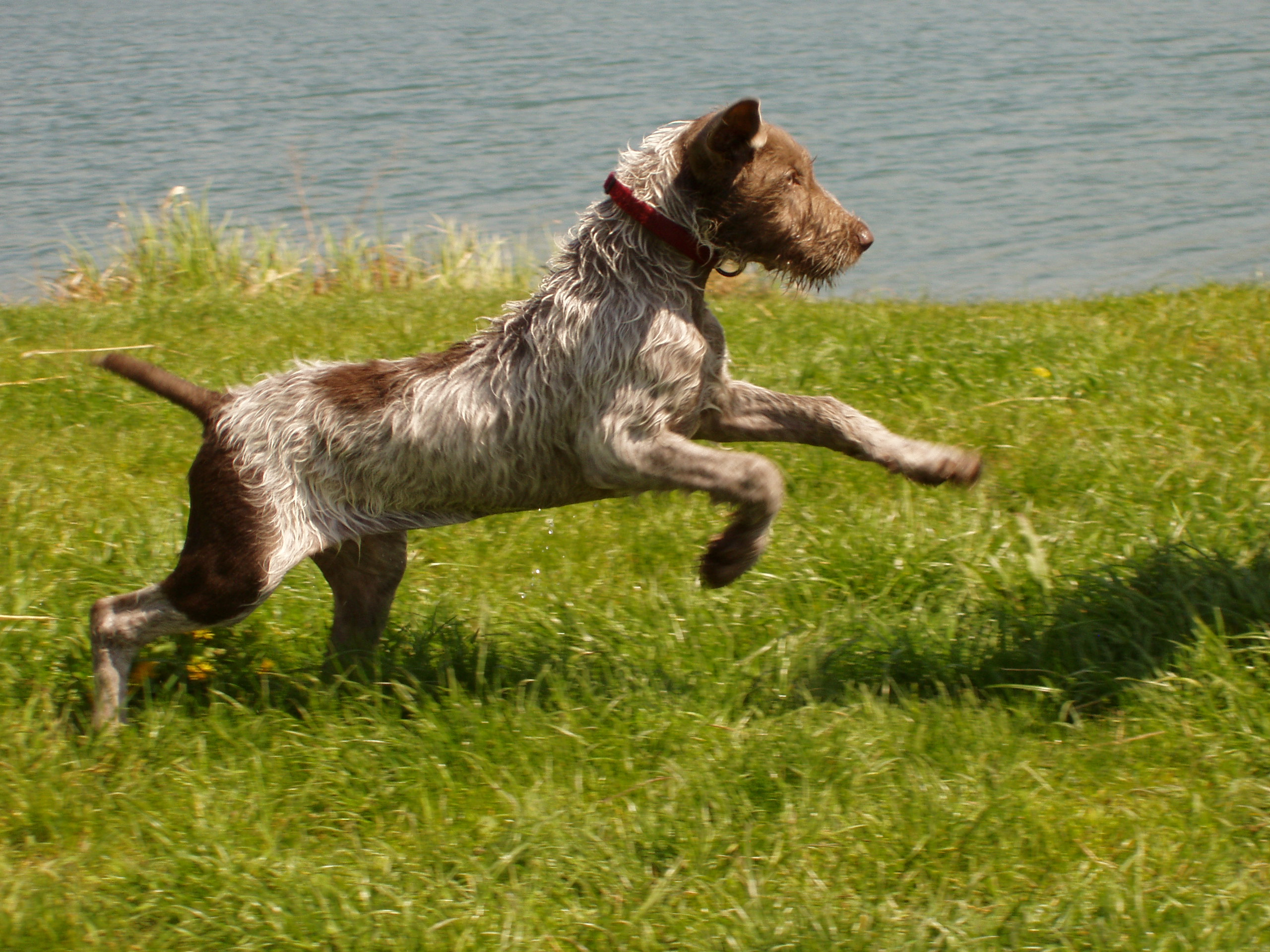 Bella z Milhostovských polí, 4 Month, Slovakian Wire-haired Pointing Dog